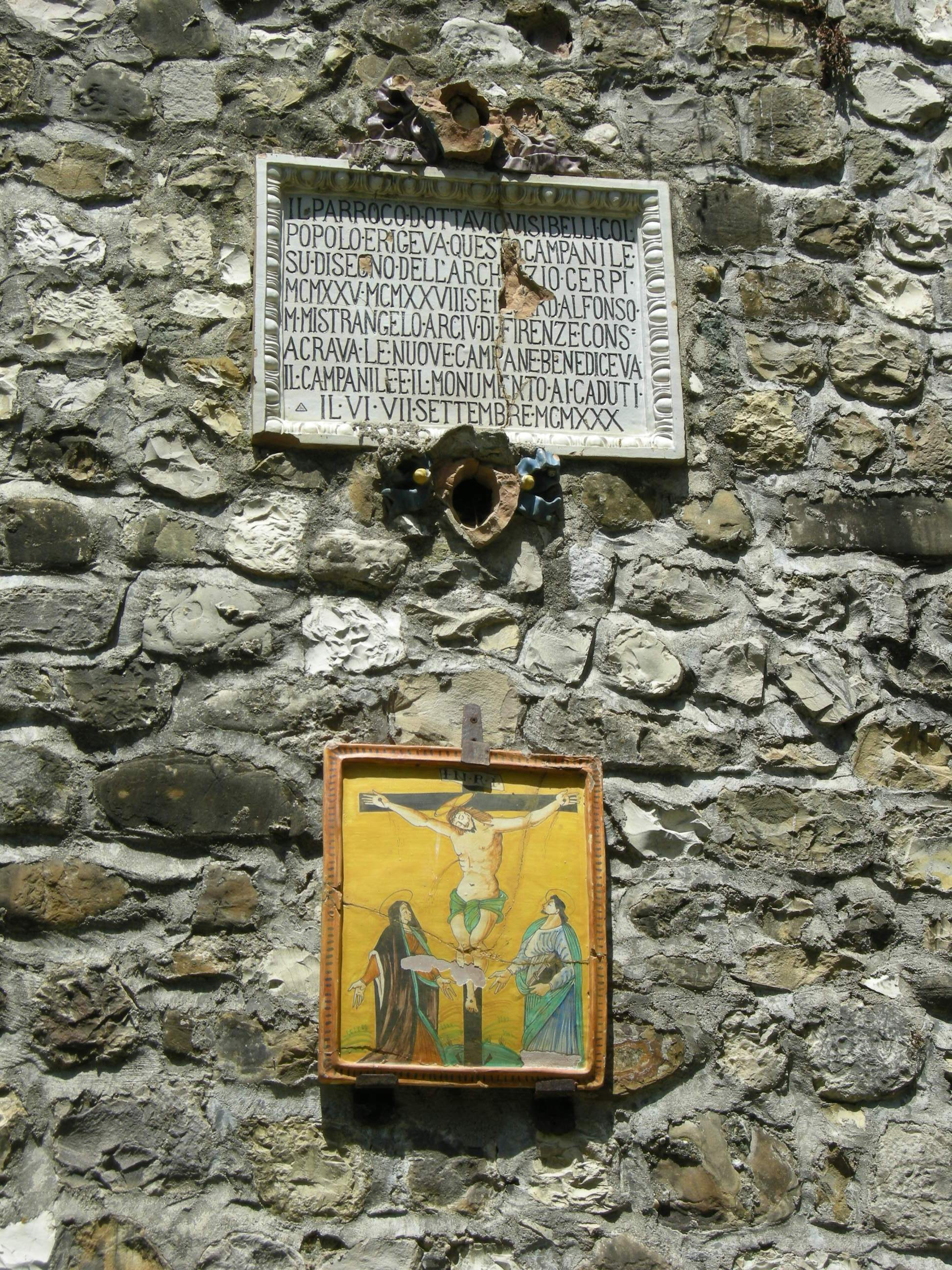 Chiesa di santo stefano a lucignano